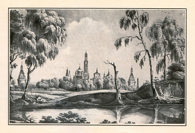 Вид Симонова монастыря со стороны Лизиного пруда. Литография с оригинала К. Рабуса (1840-е гг.)